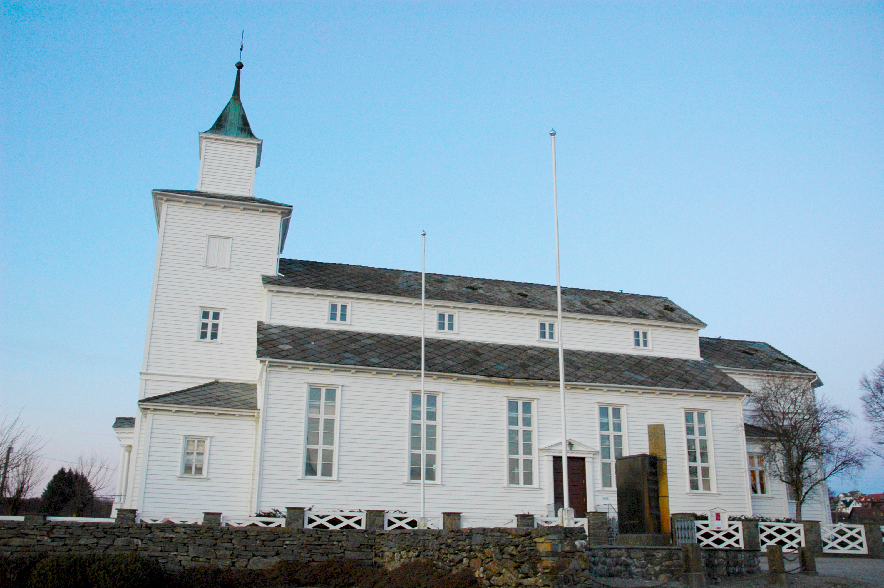 Sveio kirke, Hordaland